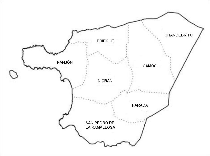 mapa de las parroquias del municipio de Nigrán